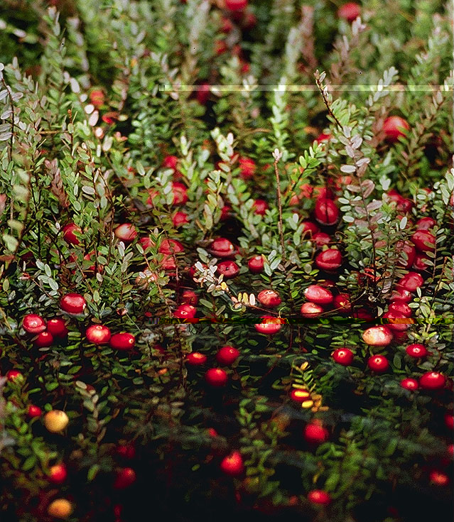 Großfrüchtige Moosbeere (Vaccinium macrocarpon) - "A coastal Washington cranberry bog"